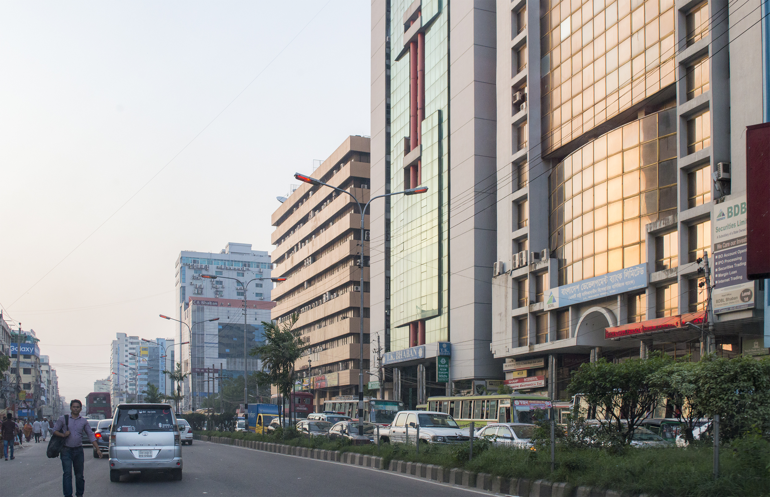 Dhaka